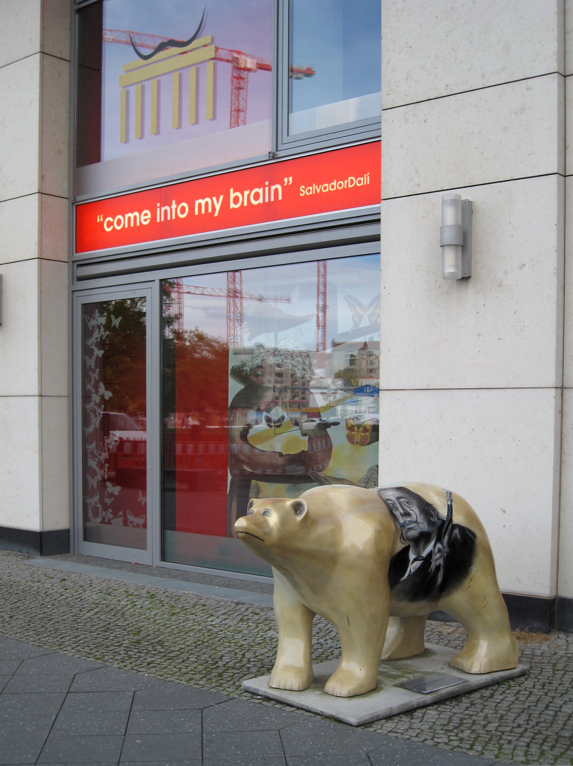 Dali – Die Ausstellung am Potsdamer Platz in Berlin, Leipziger Platz 7. Vor dem Eingang Buddy Bär - Modell "DALI", Künstler: Lubos Vavro, BBB Nr. 455.